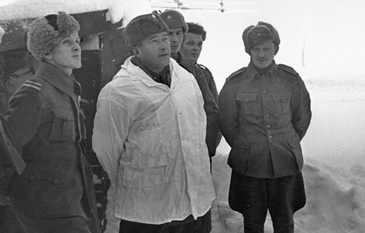 Eversti Hjalmar Siilasvuo (1892–1947).